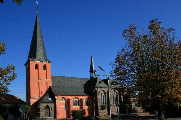 Denkmal Nr. 11 in Schwalmtal-Dilkrath